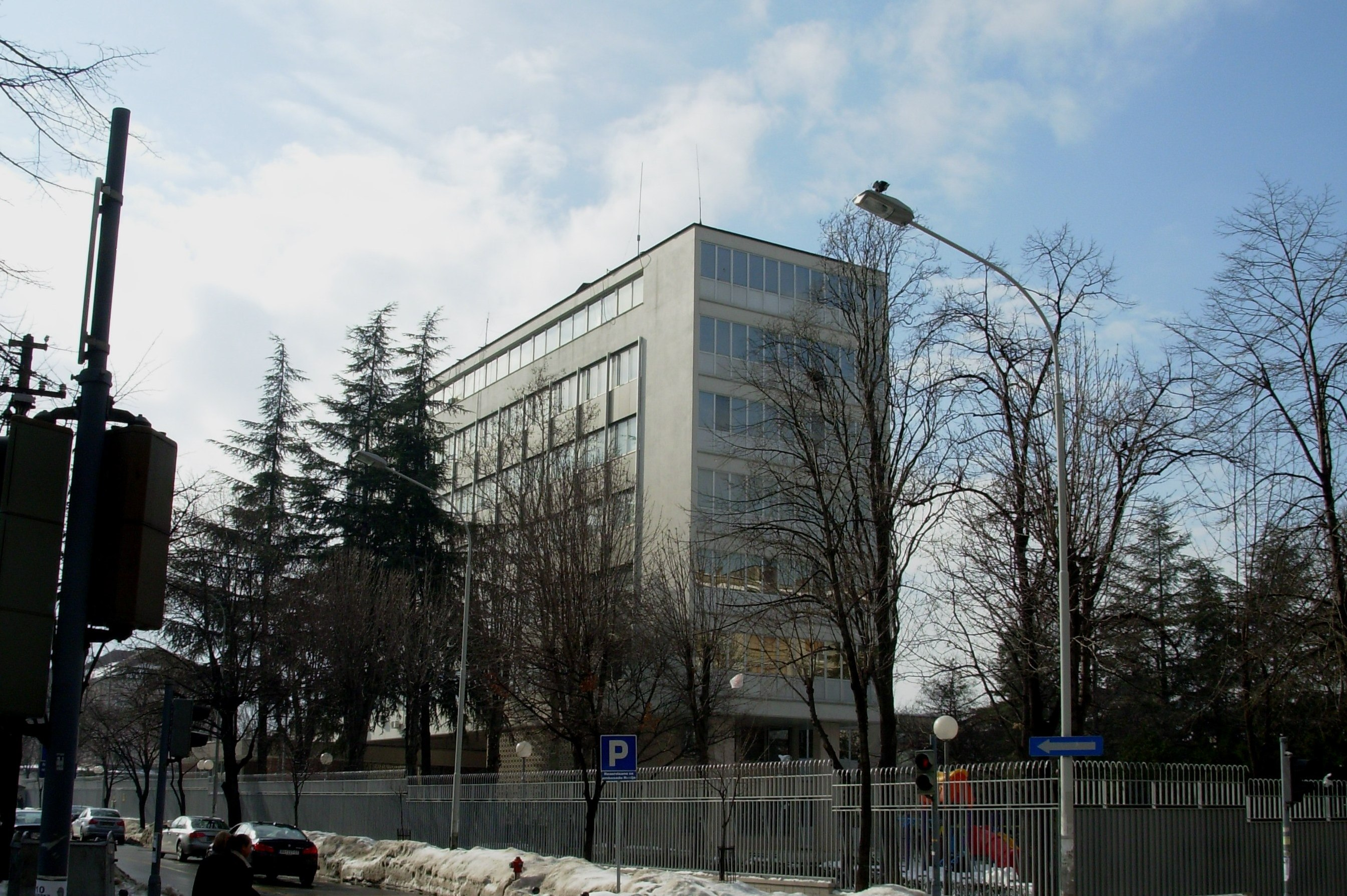 Ambasada Rusije u Beogradu. Slikao Goldfinger